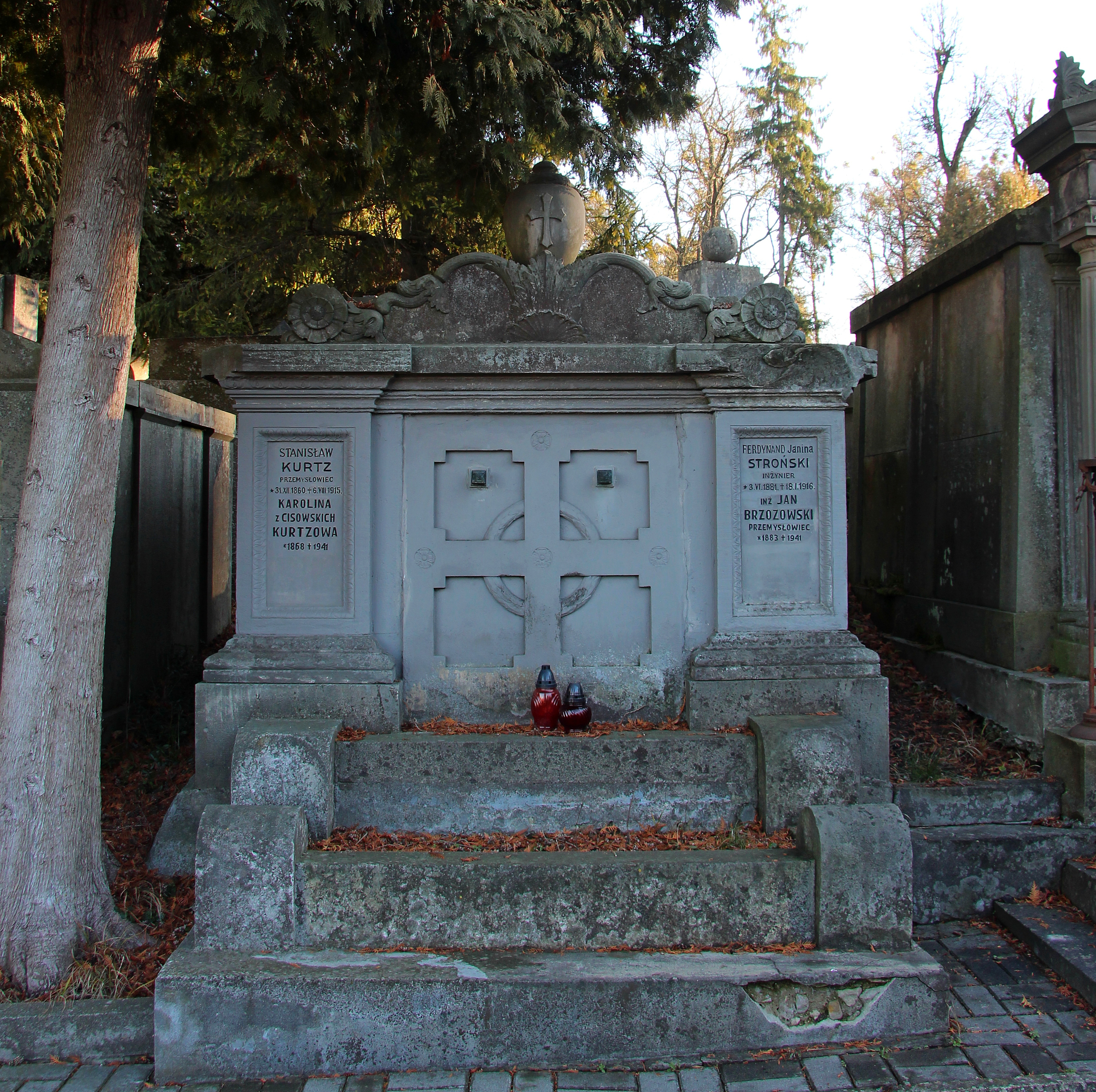 Гробниця у якій похований Ян Галюх-Бжозовський. Личаківський цвинтар ,поле № 3.